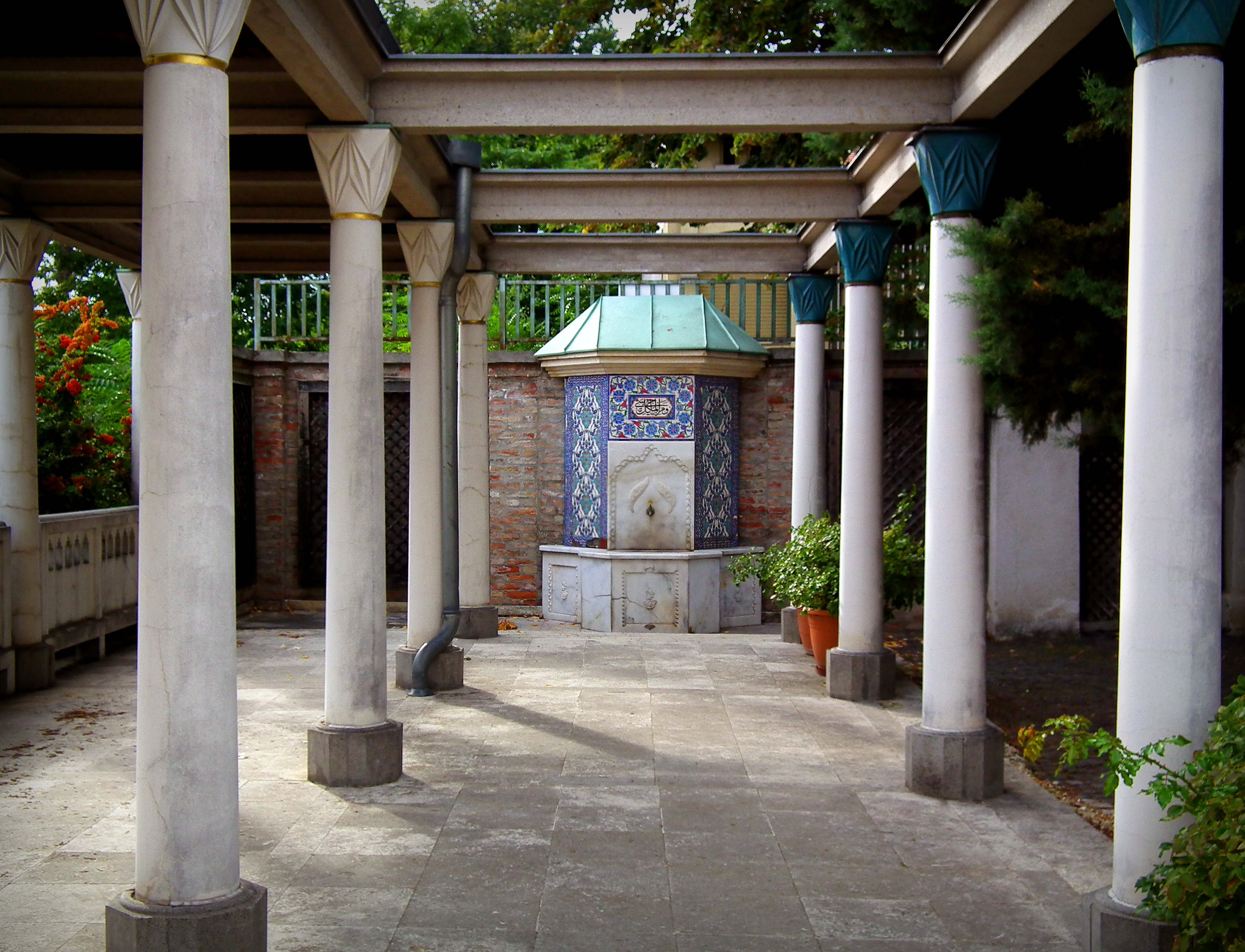 Gül Baba türbéje This is a photo of a monument in Hungary. Identifier: 290